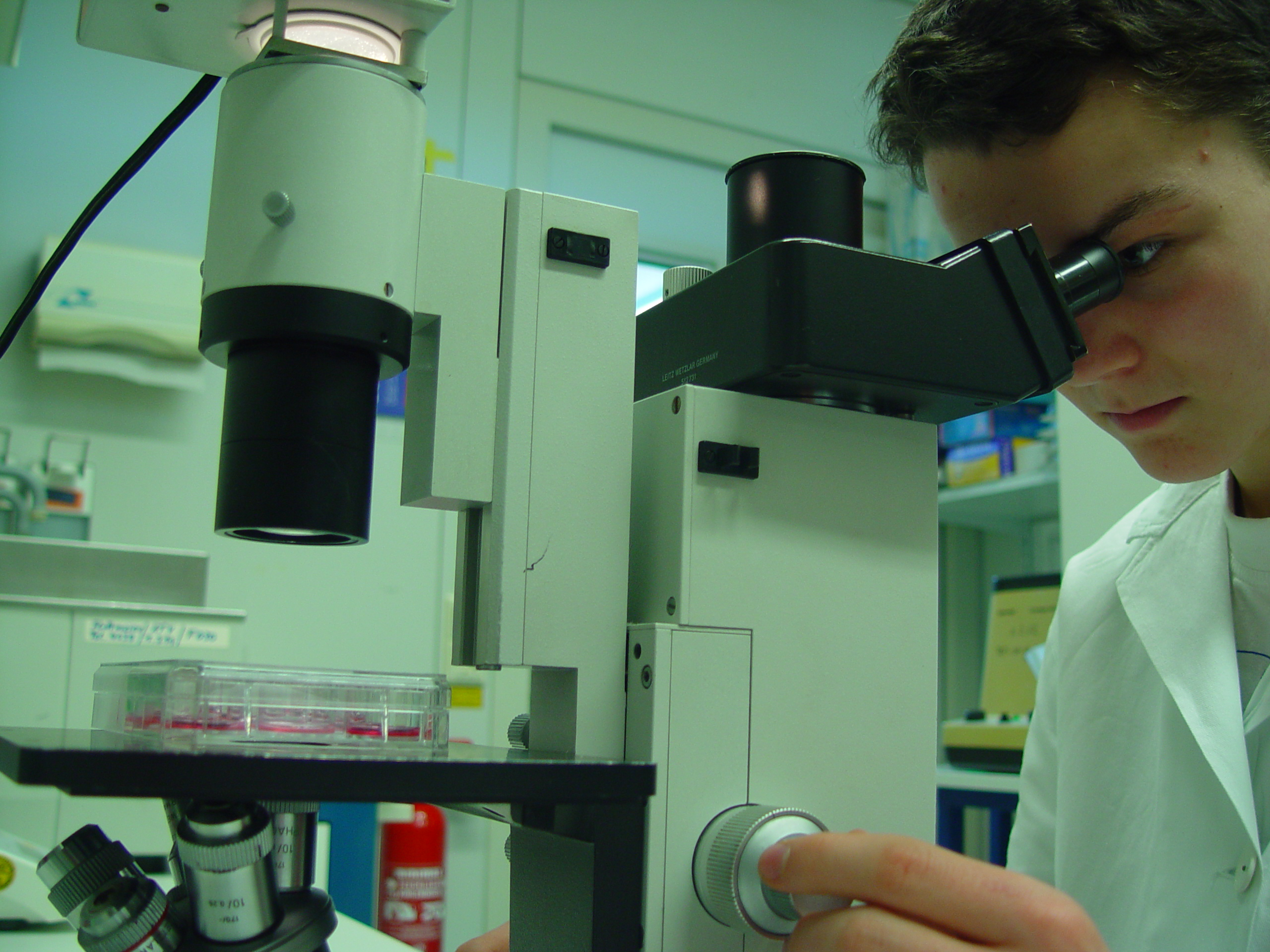 Bild des Heidelberger Life-Science Lab